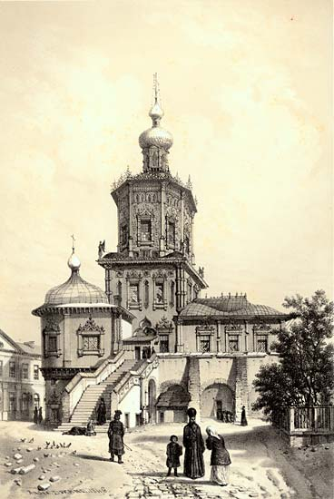 Кафедральный собор святых Петра и Павла. Литография из альбома Андре Дюрана.